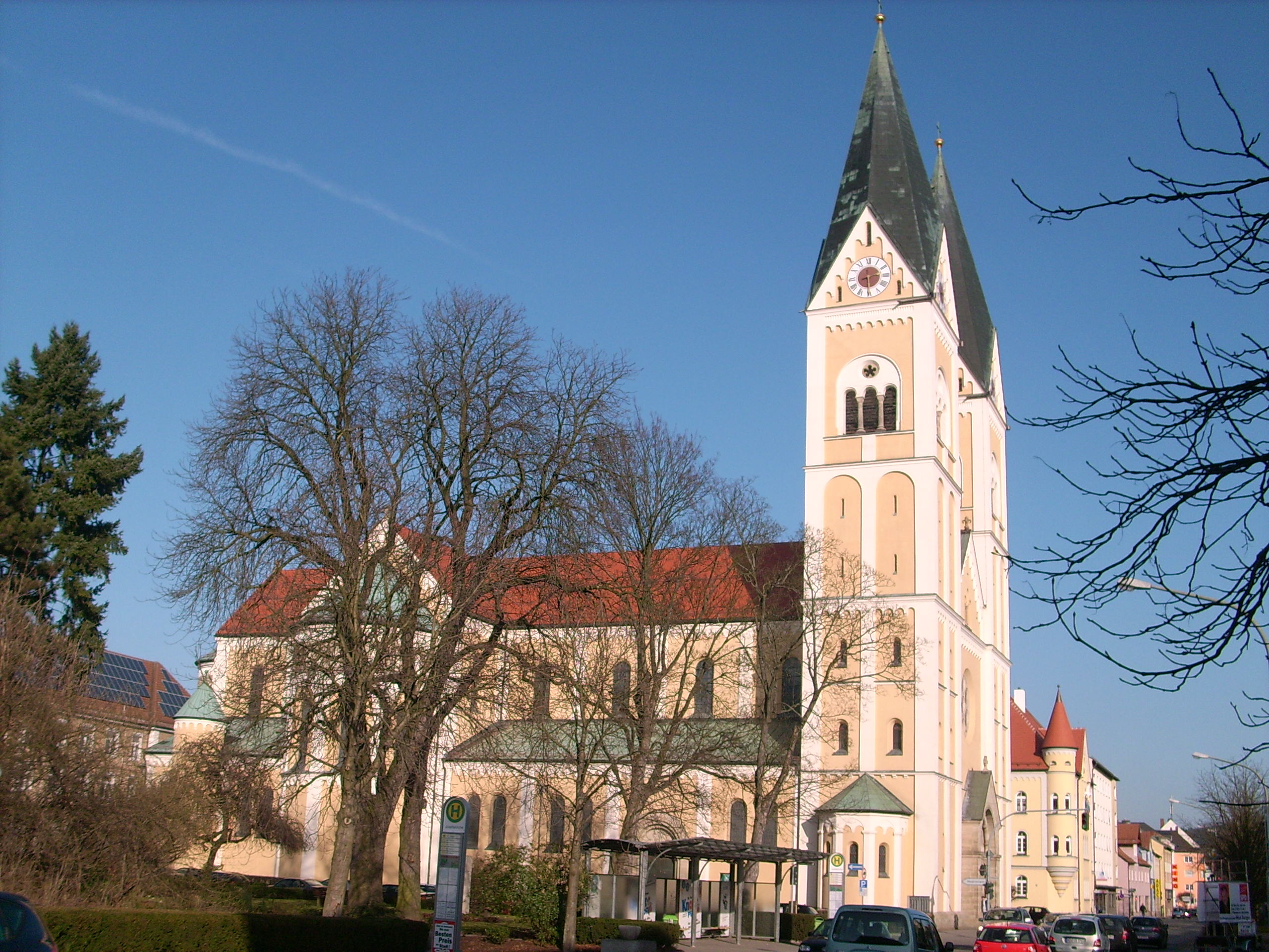 Blick auf die Westseite der St. Josefskirche